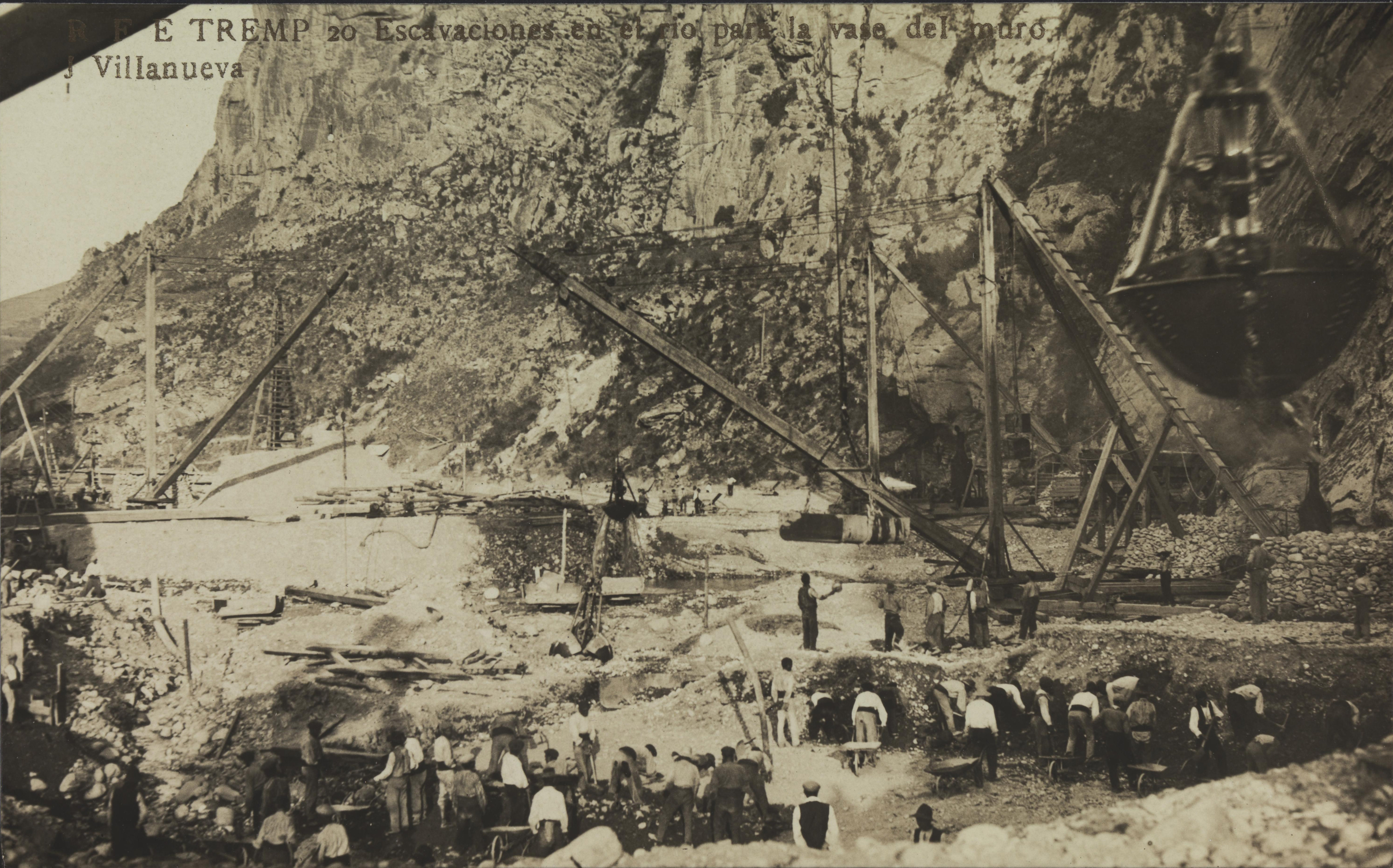 Treball a la llera del Noguera Pallaresa per a la construcció de la presa de l'embassament de Sant Antoni (Pallars Jussà)